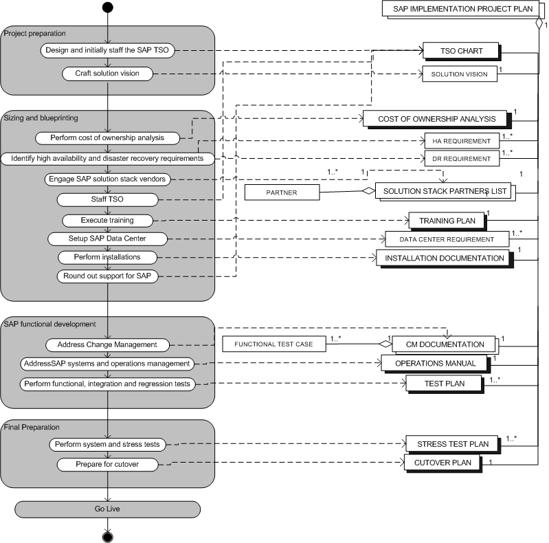 Process-Data Diagram